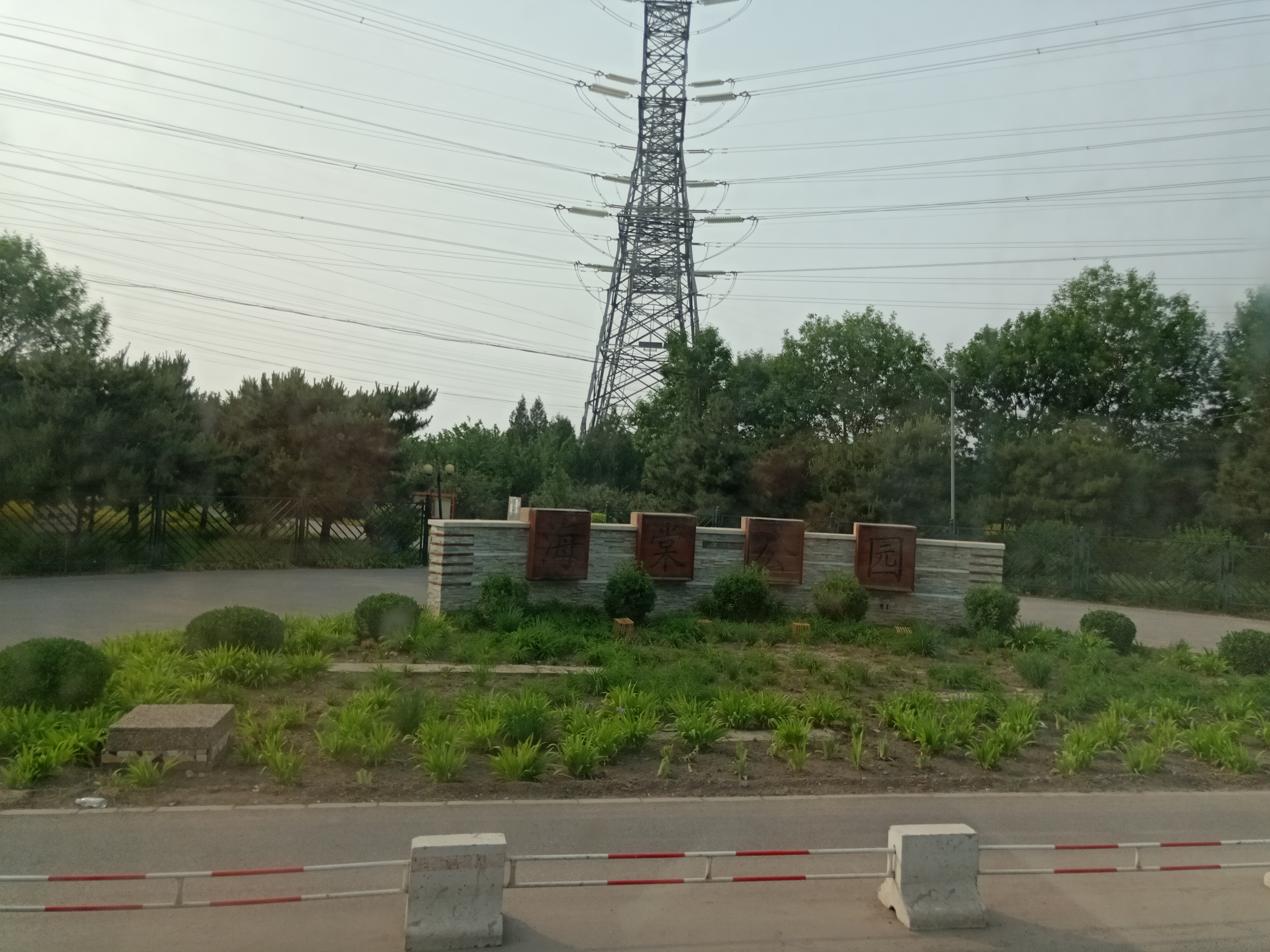 粵語: 喺北京朝陽區海戶屯同老君堂之間嘅海棠公園